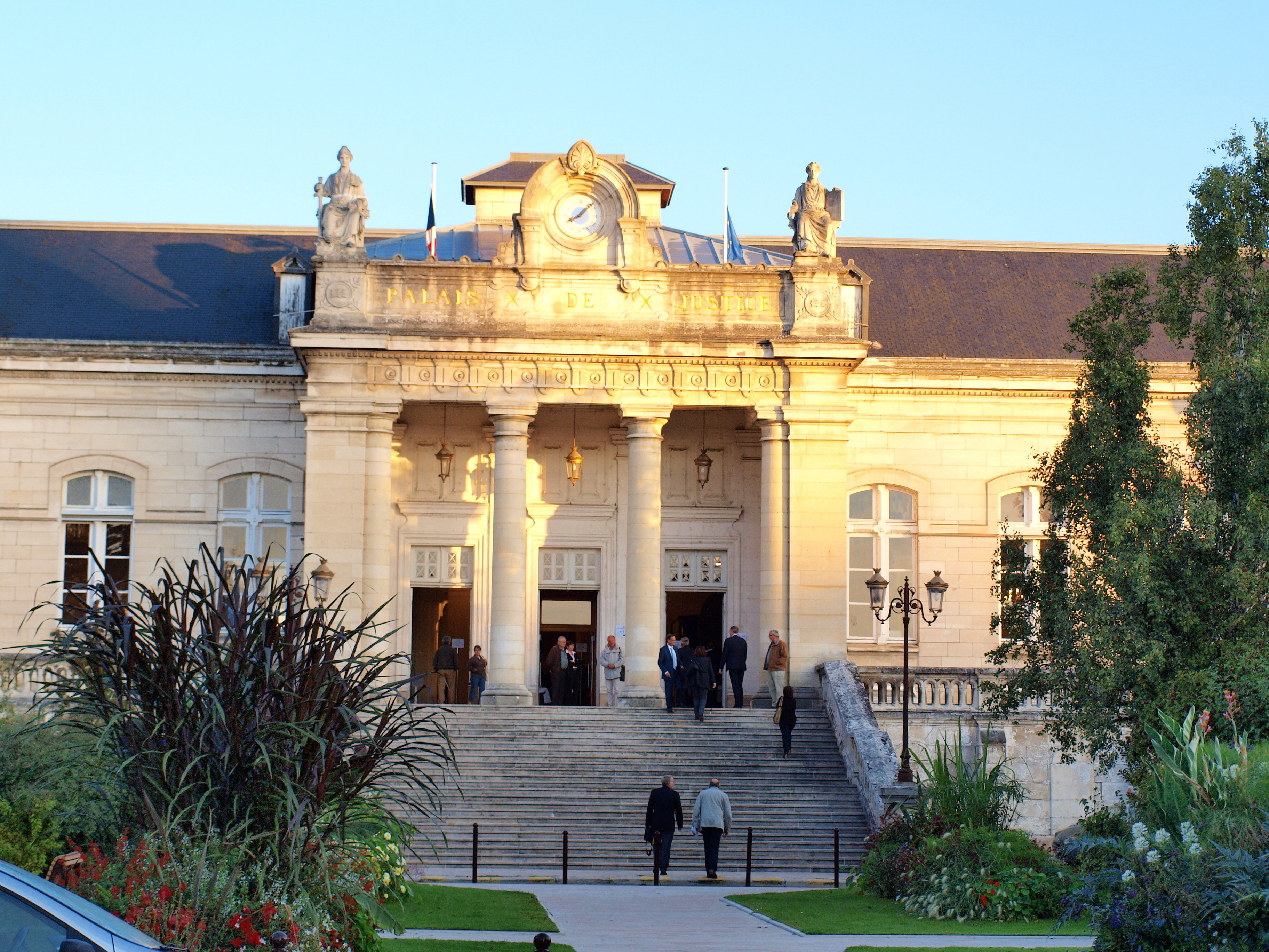 Palais de Justice d'Auxerre (Yonne, France)